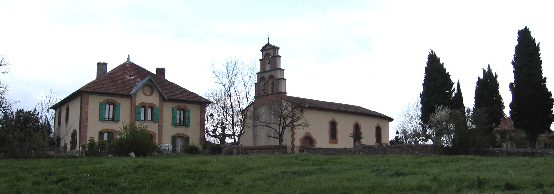 Village de Lescousse, Ariège.